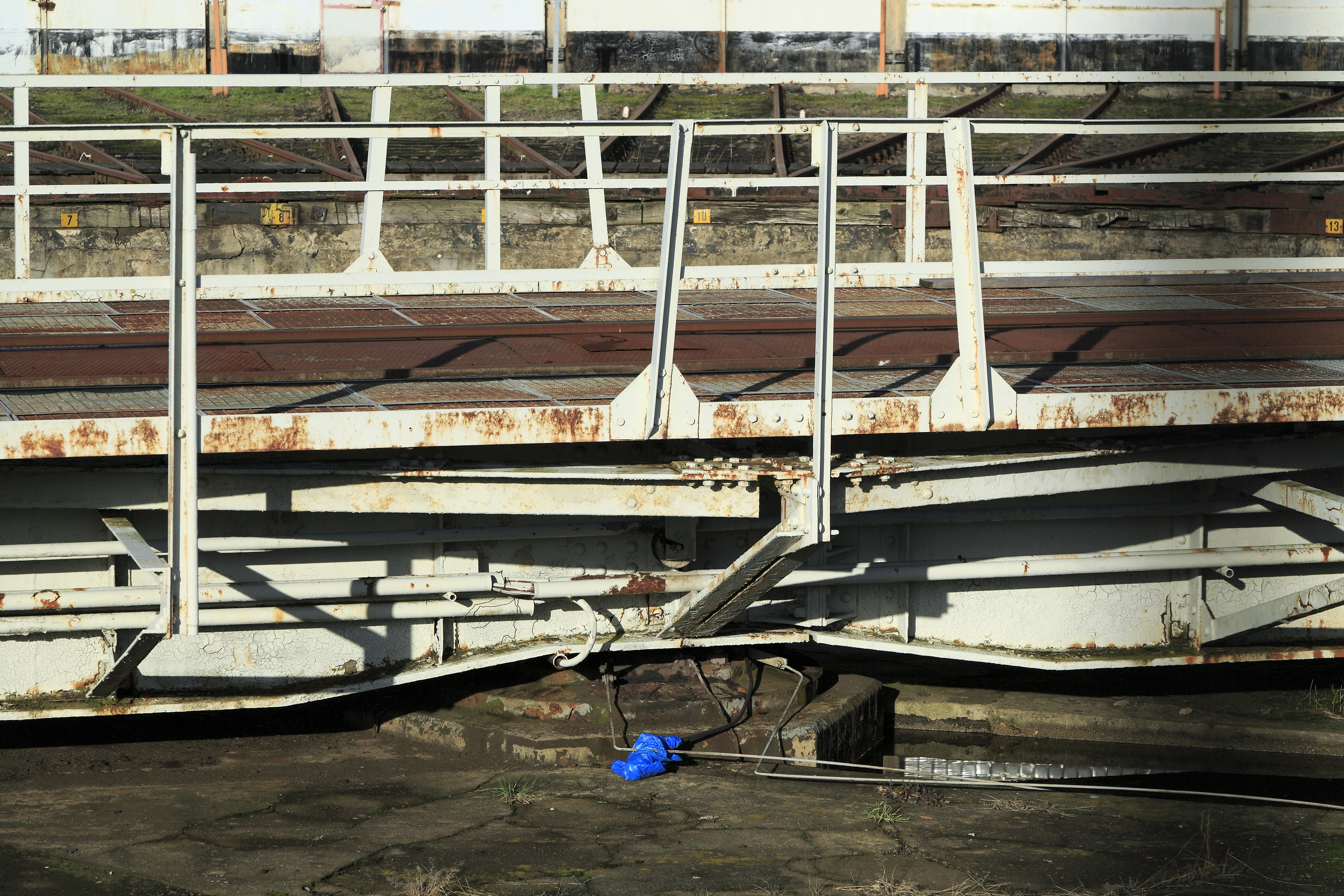 Drehscheibe vor dem Rundhaus im oberen Güterbahnhof, Stw 5, durch das Gelenk liegen beide Tele der Drehscheibenbrücke stabil auf drei Punkten auf, die Laufräder sind immer belastet und durch die verringerte Stützweite können die Träger deutlich flacher ausfallen.